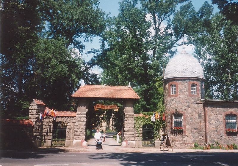 Der Eingang des Parkgeländes von Schloss Schenkendorf 1998